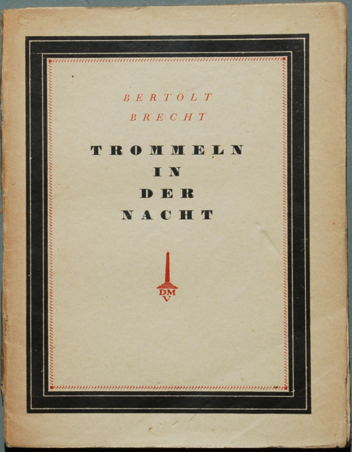 Bertolt Brecht: Trommeln in der Nacht. Drama. München: Drei Masken 1922, 98 Seiten. Original-Broschur des Verlags kl. 8° (168 x 130 mm), Erstausgabe.